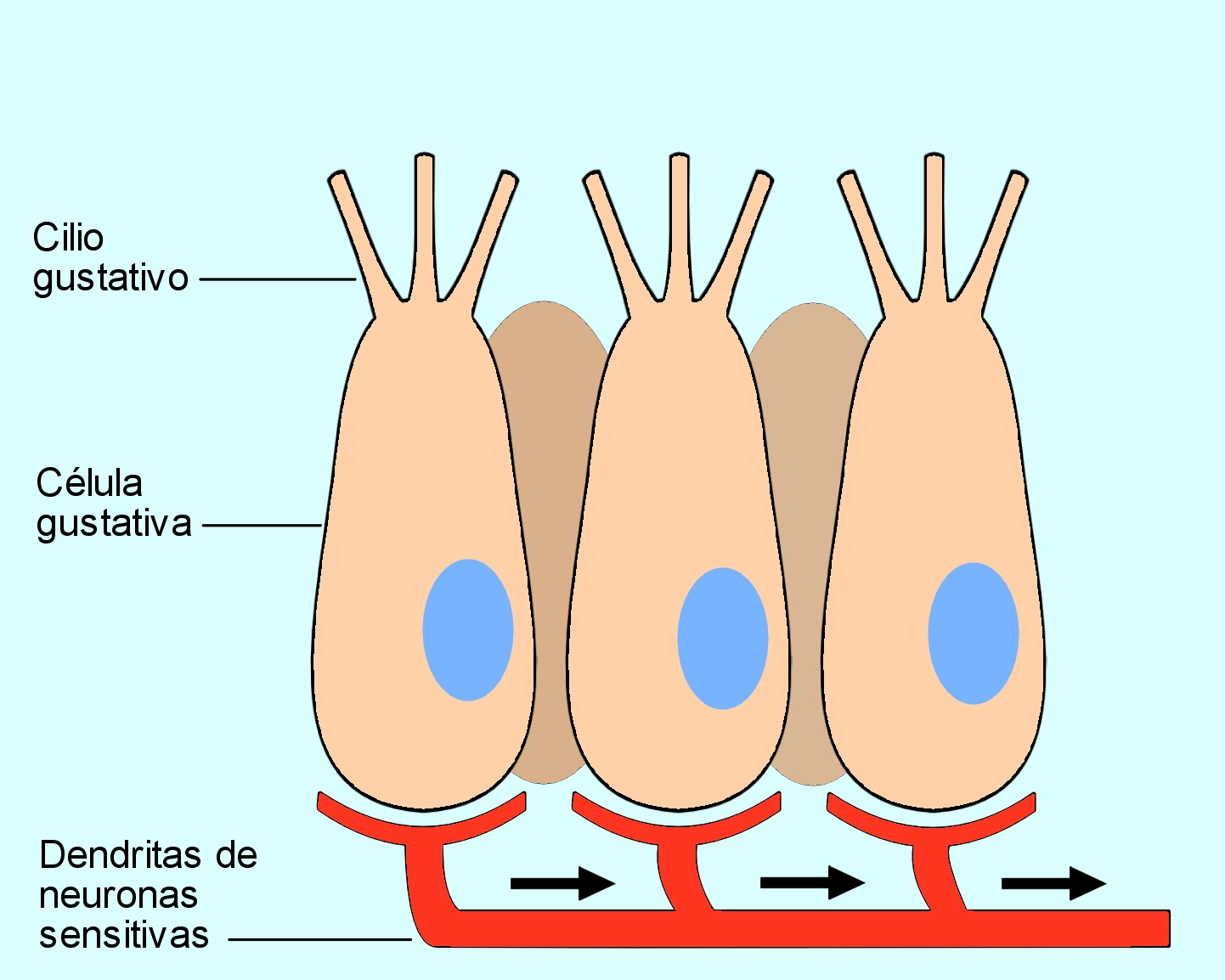 Esquema en el que se representan varias células gustativas de la lengua y su conexión a las dendritas de una neurona sensitiva